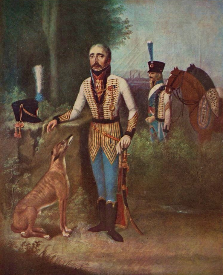 François Xavier de Schwarz (1762-1826) en uniforme de colonel du 5e régiment de hussards. A l'arrière plan, un soldat attend ses ordres. Ce tableau signé Revel est exposé dans la salle d'honneur du régiment. Après avoir fait brillamment les campagnes de 1805 à 1806 au sein de la Grande Armée, Schwarz est promu général de brigade et obtient un commandement en Espagne. Il y enchaîne les défaites : El Bruc en 1808, Manresa en 1810 et La Bisbal la même année où il est capturé. Il passe les quatre années suivantes en captivité avant de revenir en France et d'y mourir en 1826.